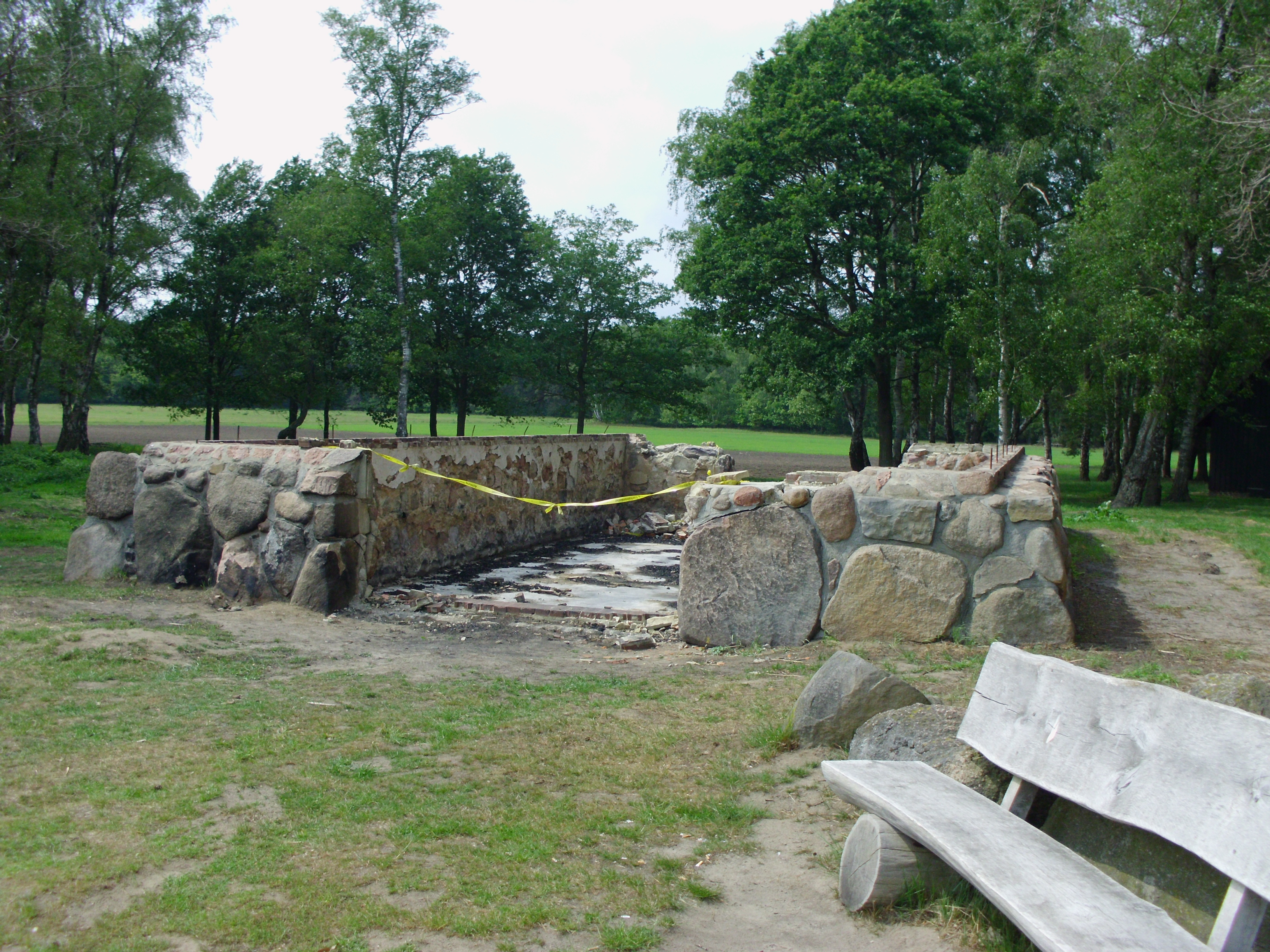 ausgebrannter Schafkoben am Gräberfeld von Pestrup